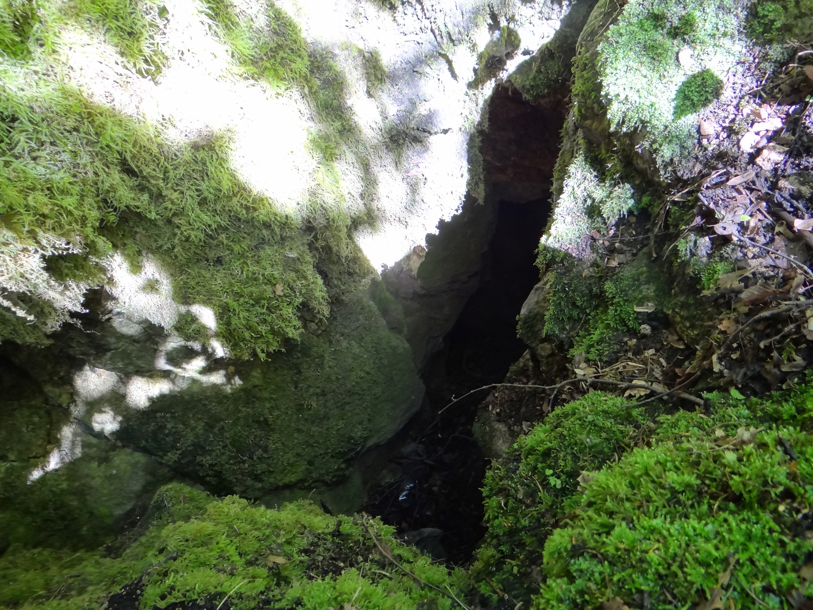 Pośredni Awen